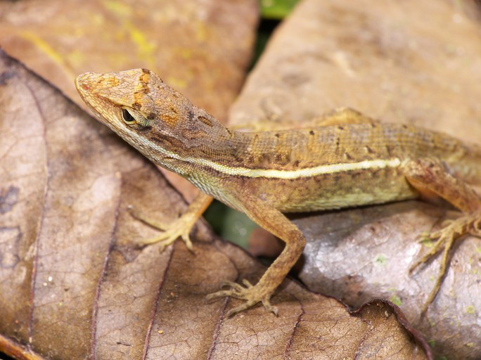 Norops auratus